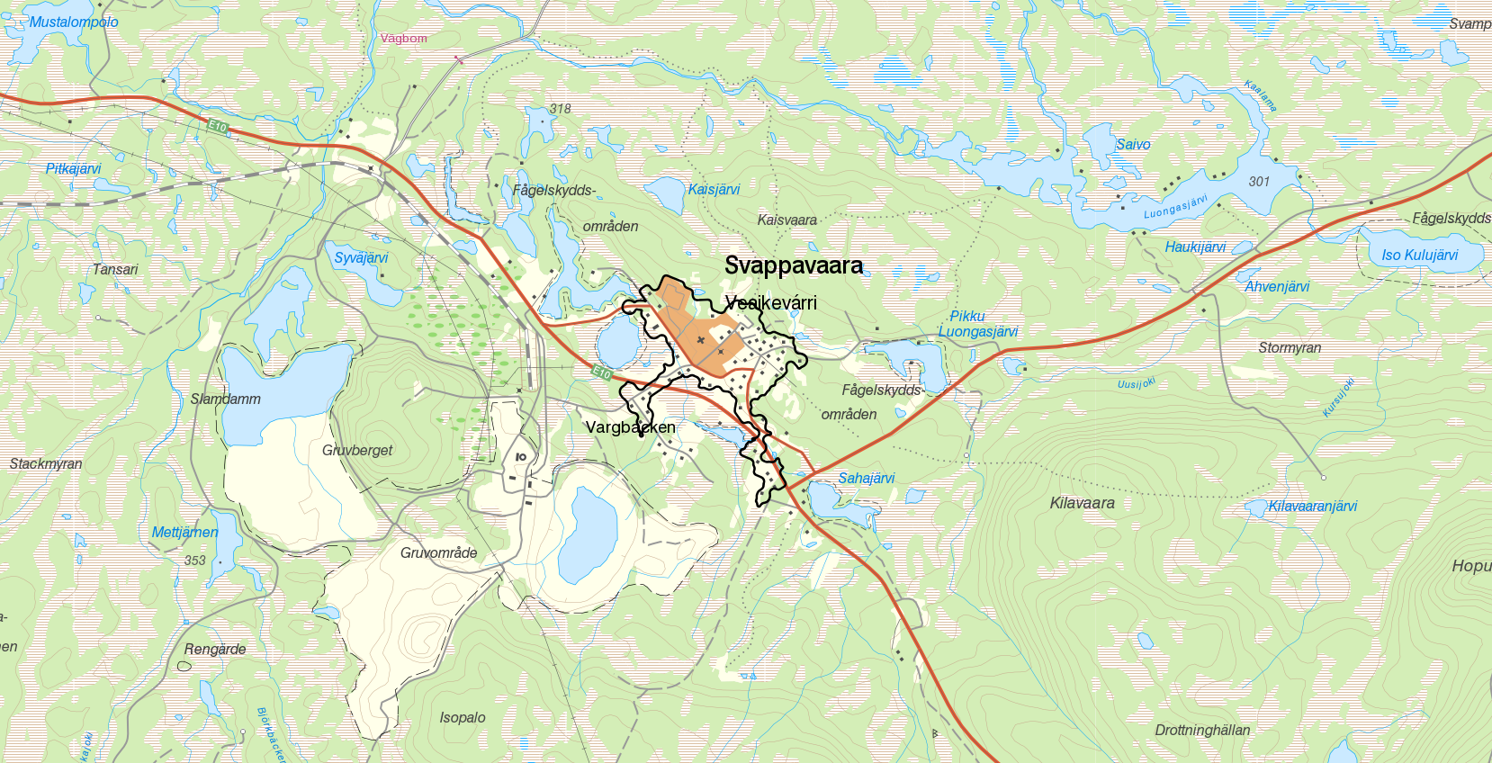 Tätorten Svappavaara med gränserna från Statistiska centralbyråns tätortsavgränsning 2015. Bakgrundskarta från Lantmäteriet, skala 1:30 236.